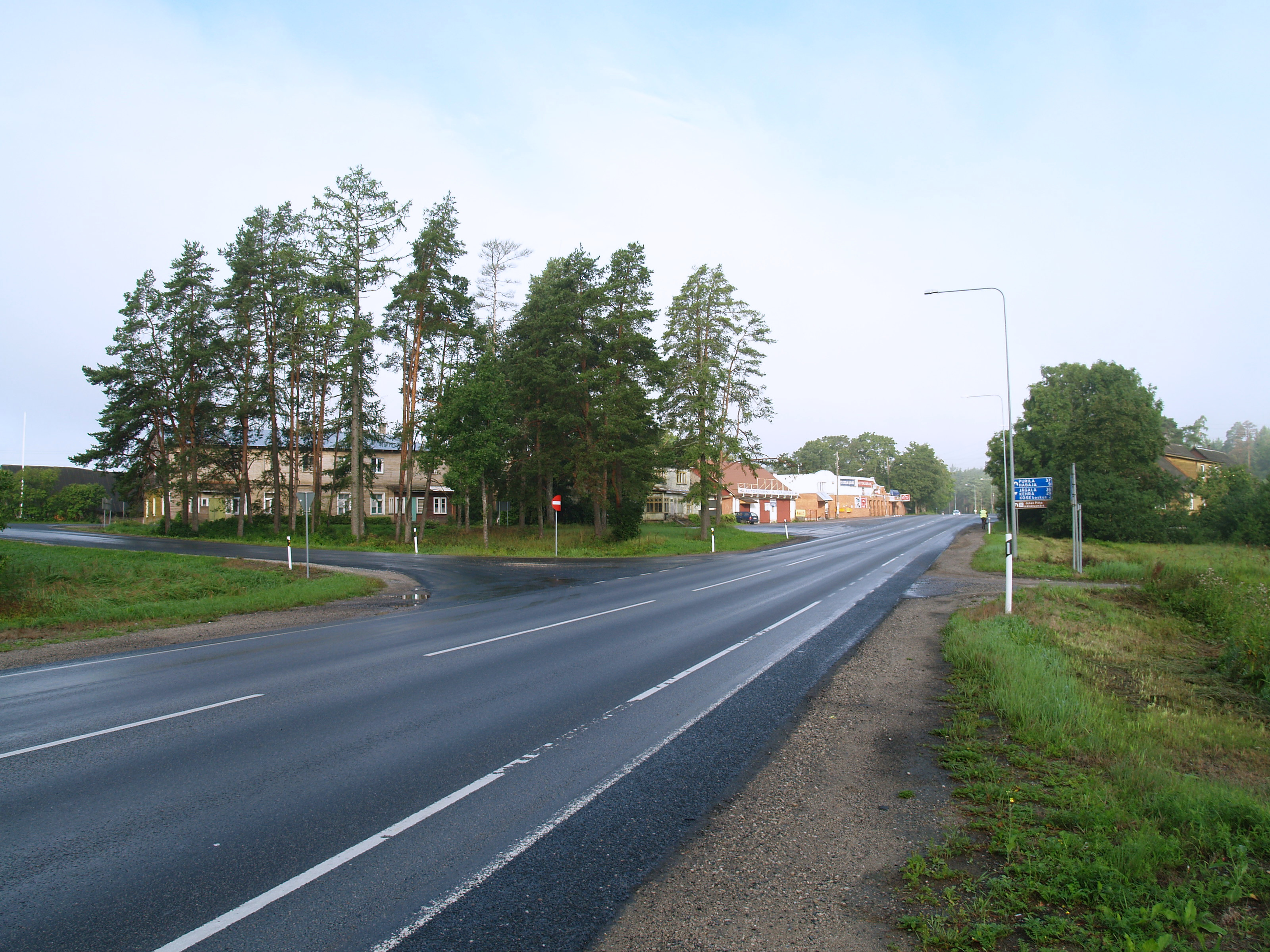 Kose-Risti. Vaade Tallinna poole.